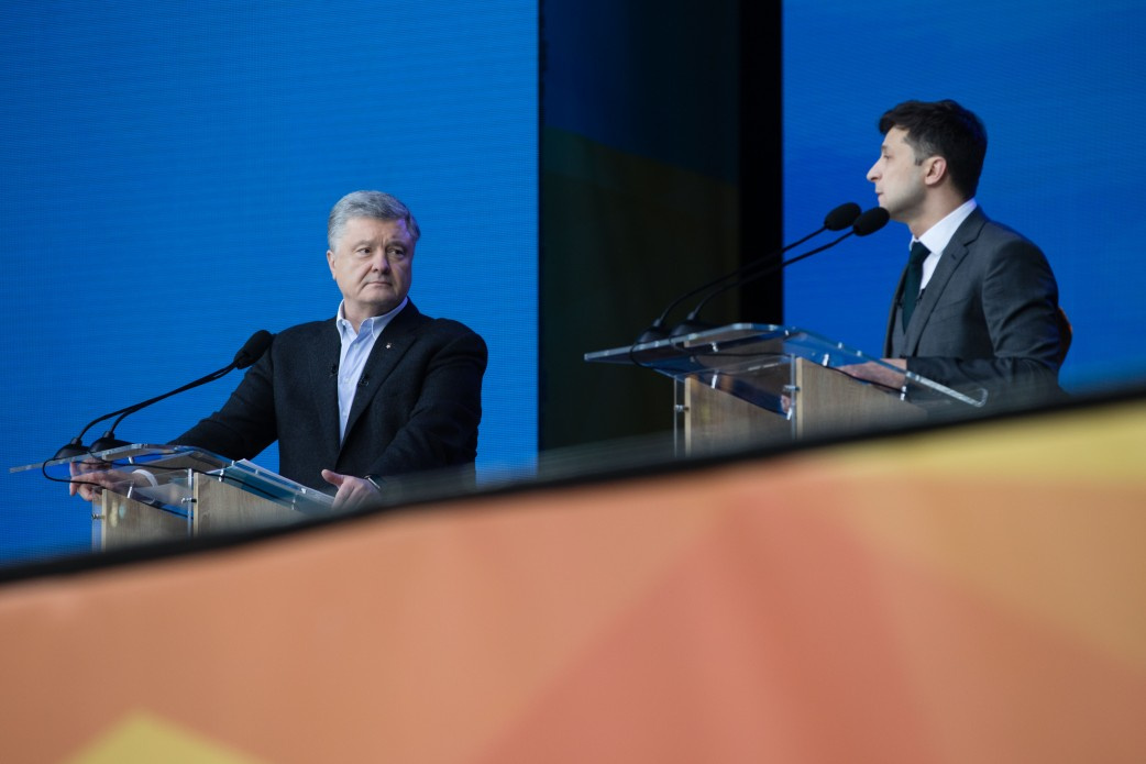 Дебаты кандидатов на пост Президента Украины Петра Порошенко и Владимира Зеленского